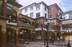 Chamdo: junge Stadtentwicklung im alten Tibet eigenes Foto: A. Gruschke (Freiburg)